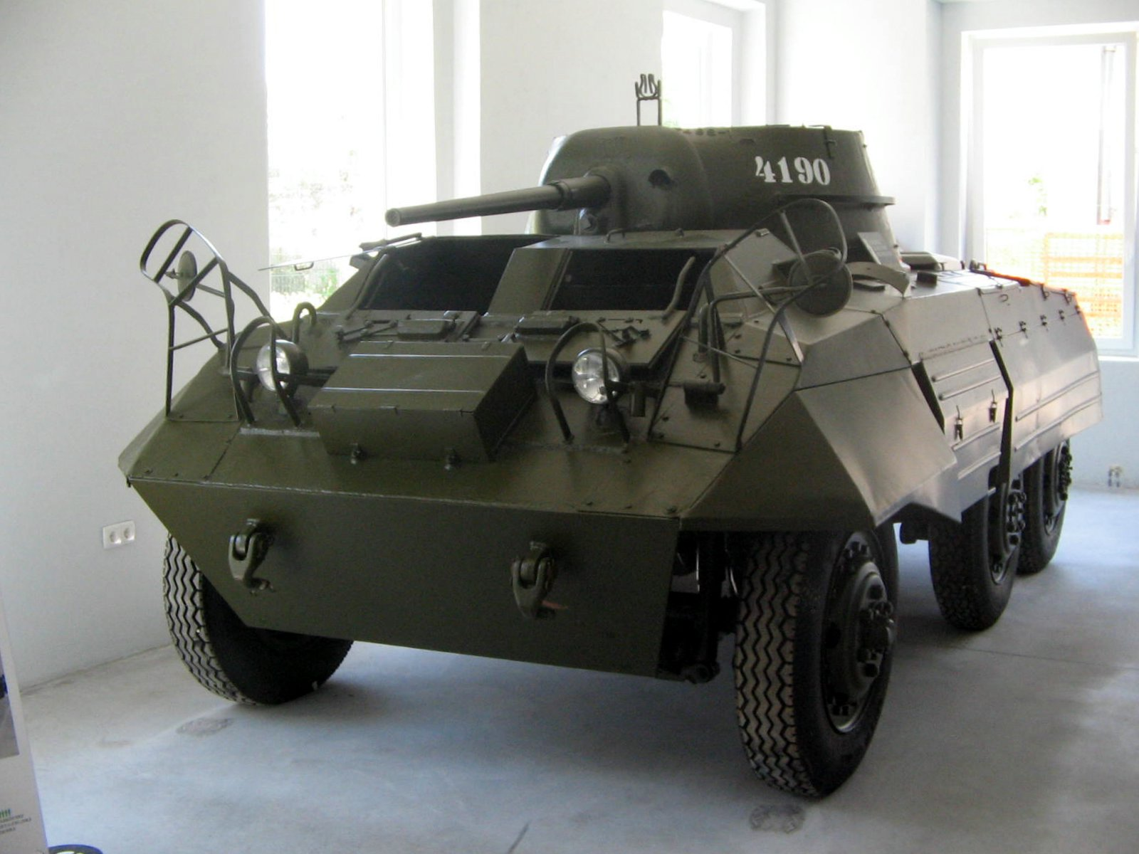 Park of Military History, Pivka, Slovenija